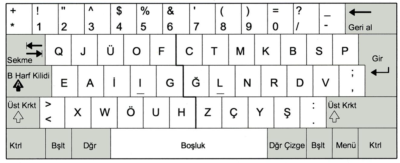 E klavye dizilimi